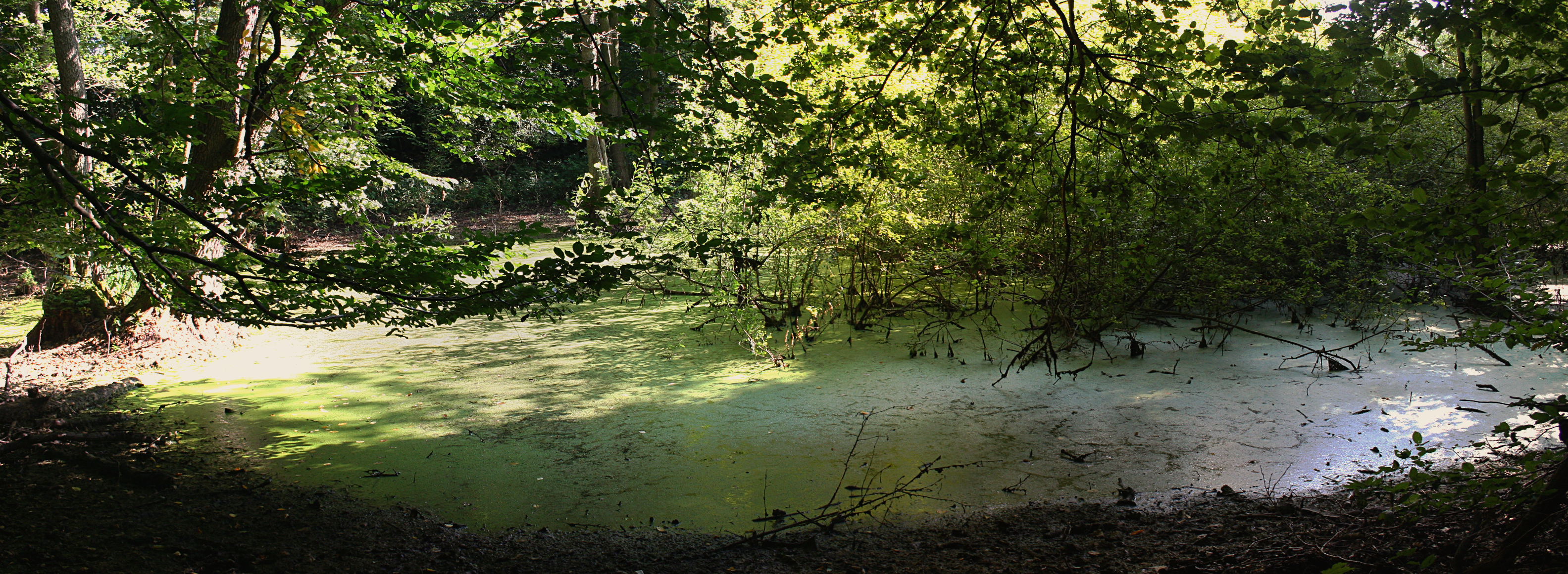 Rezerwat przyrody Dolina Kamionki - fragment przy ścieżce rowerowej